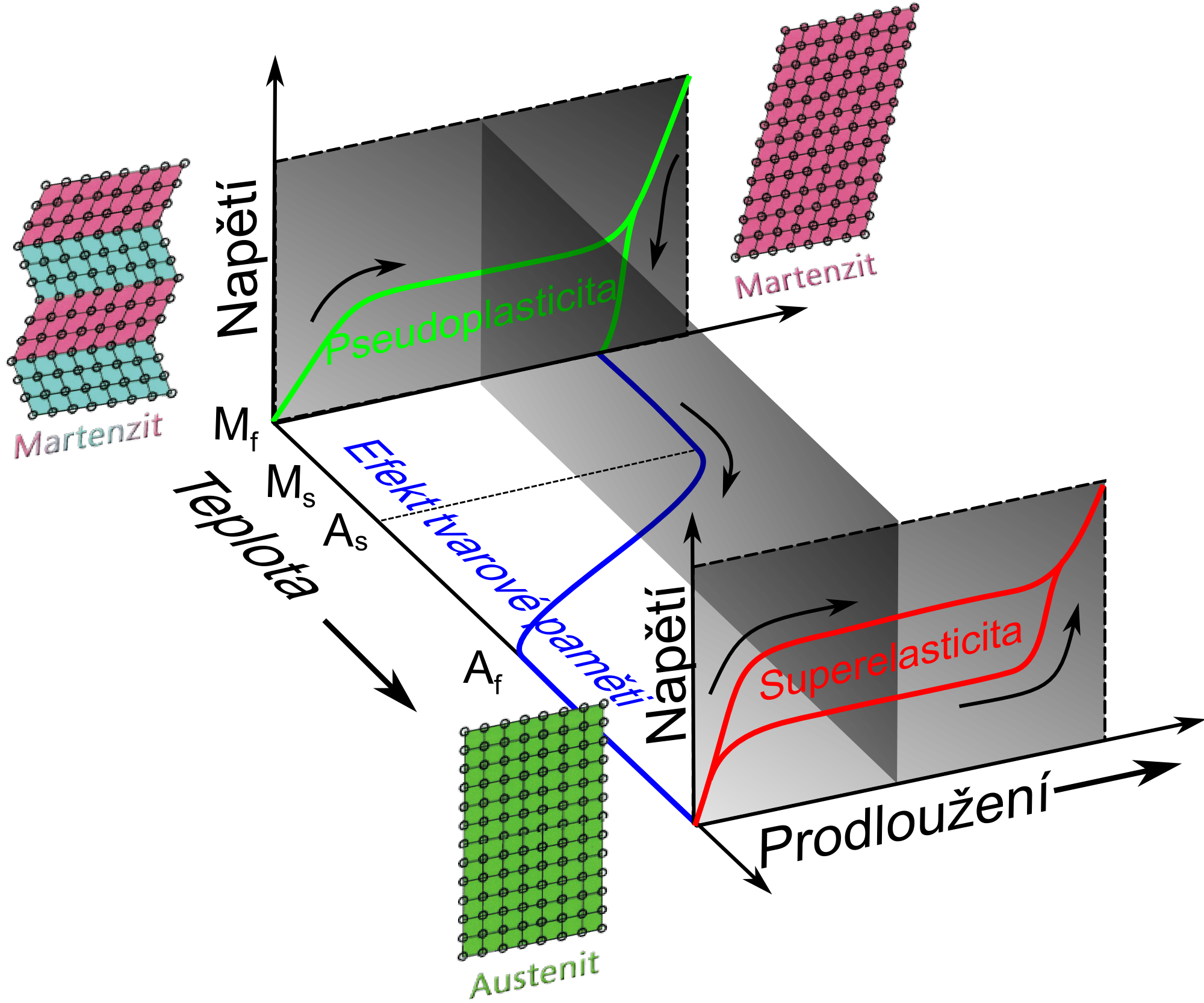 Funkcni chovani SMA slitin, vsechny efekty v jednom grafu